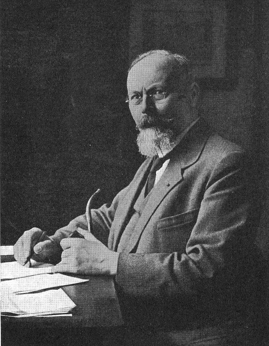 photographie en noir et blanc de Jean Haust